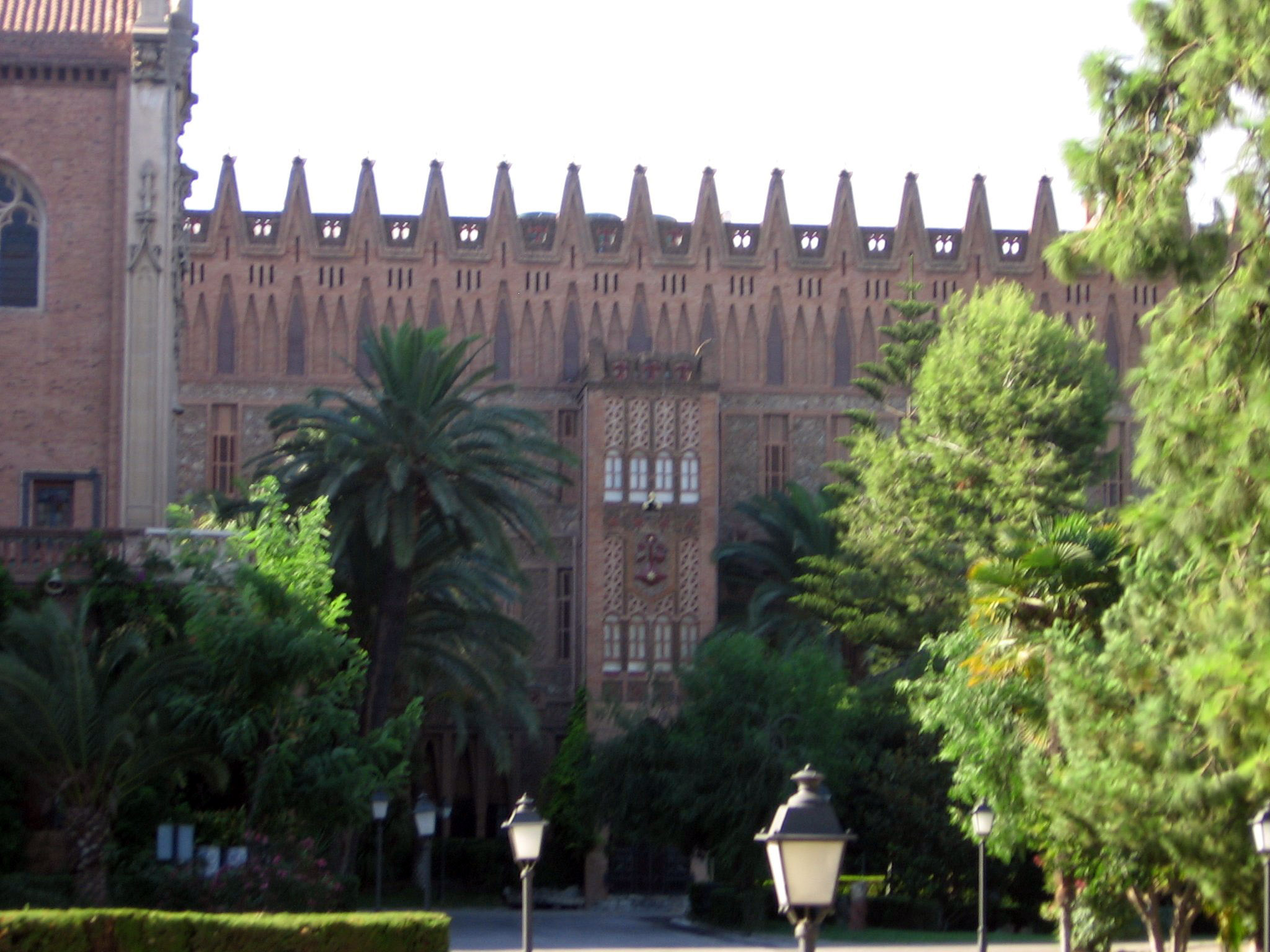 Colegio de las Teresianas, de Antoni Gaudí (Barcelona)